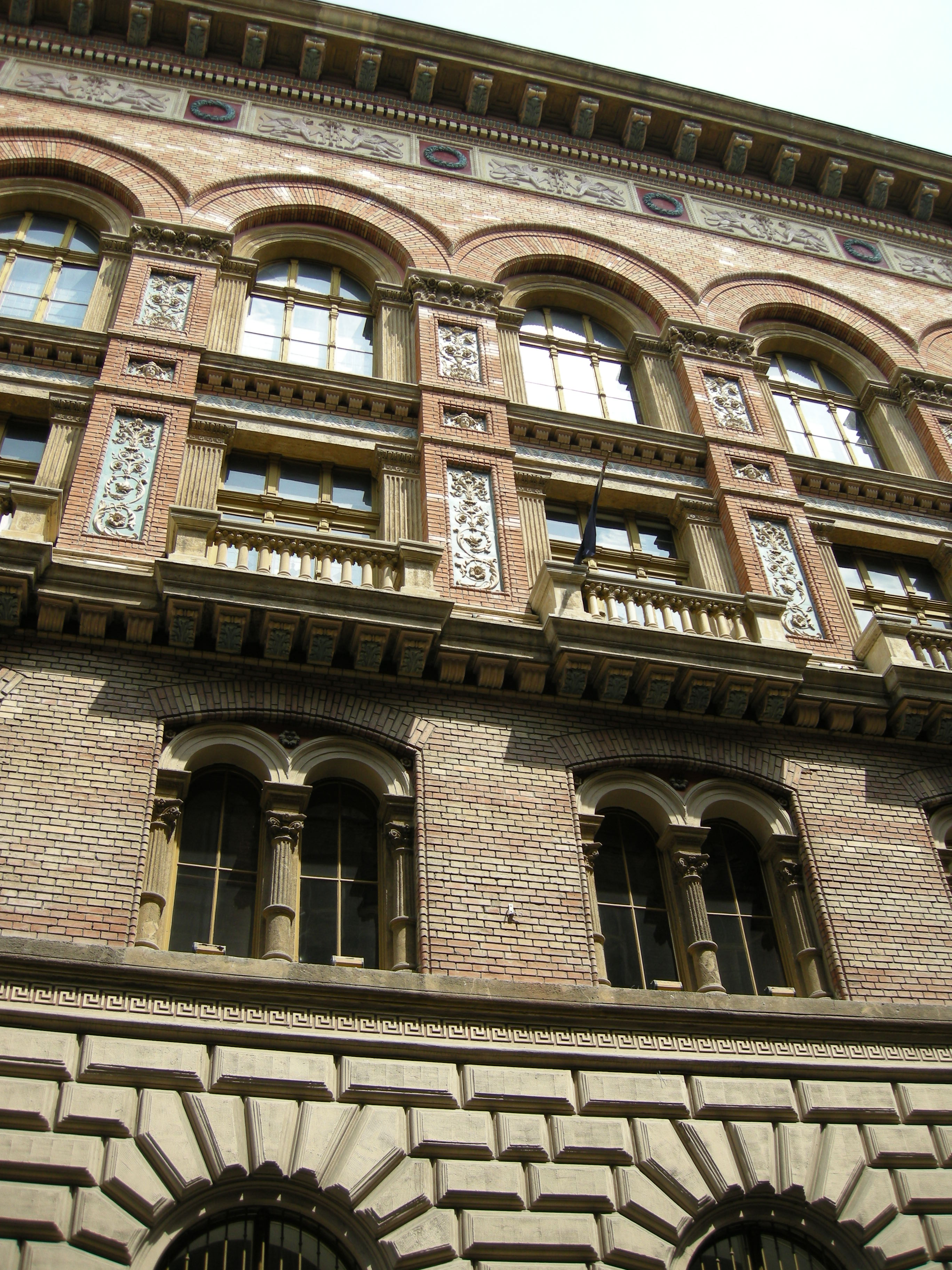 Budapest